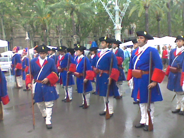 Secció del Regiment de la Diputació del General, formada a l'Arc de Triomf (Barcelona), l'11 de setembre de 2013. A la dreta: fusellers; a l'esquerra: mangraners; en primer terme, un sergent de colors de la mateixa unitat